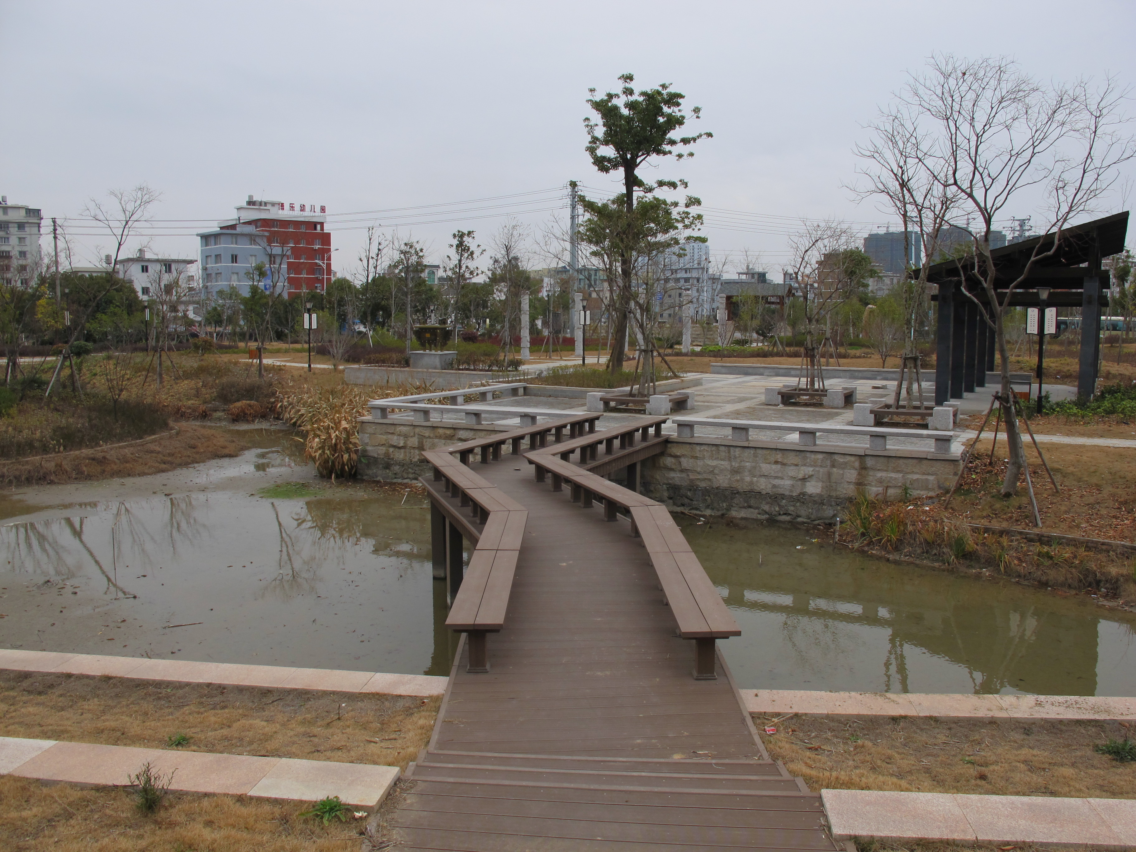 乐清东山公园风光